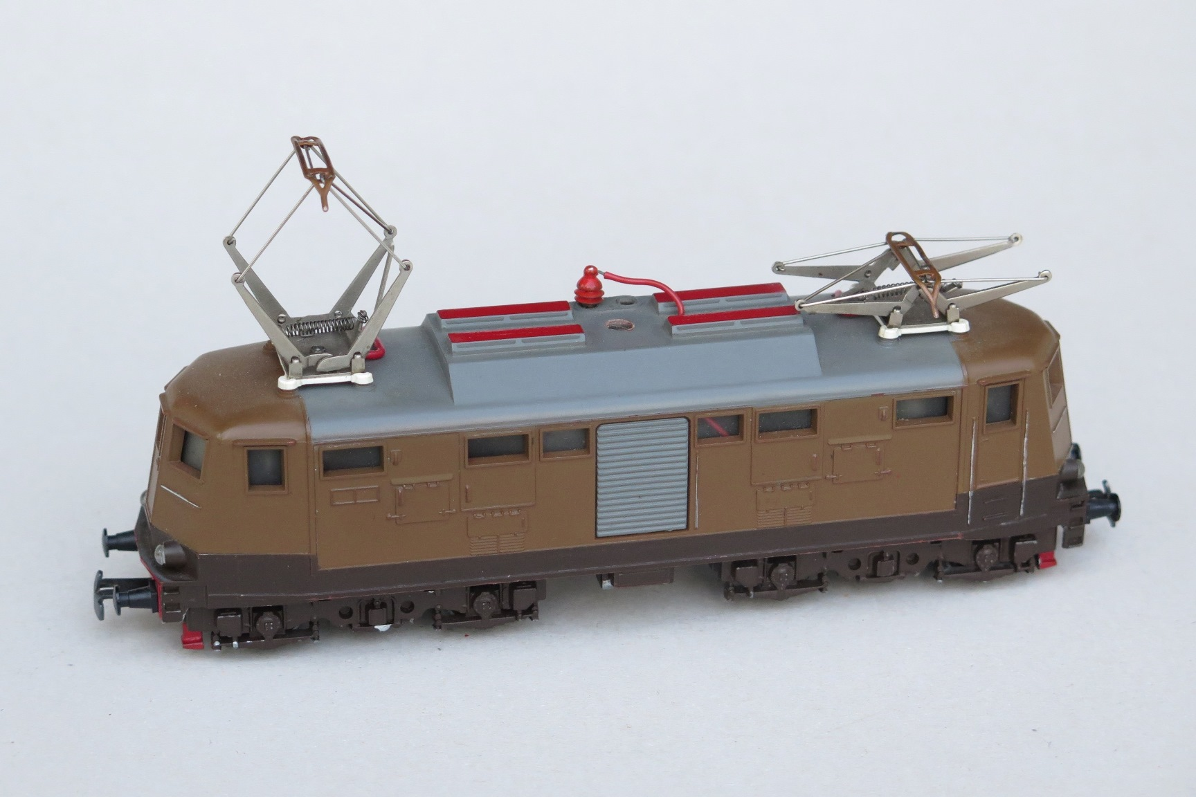 Kleinbahn Lokomotive der Baureihe E 424 der Italienische Staatsbahnen (FS).